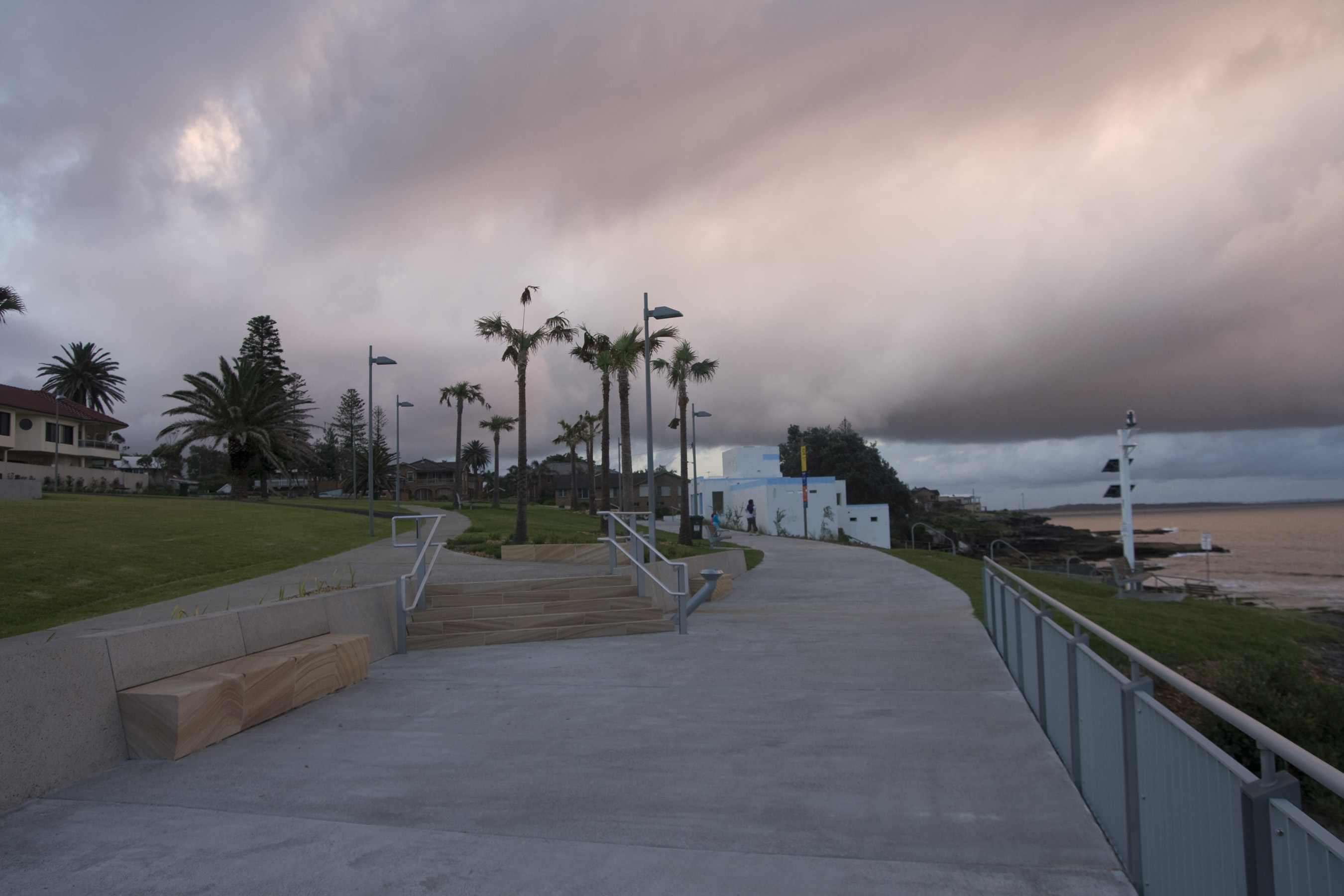 Cronulla